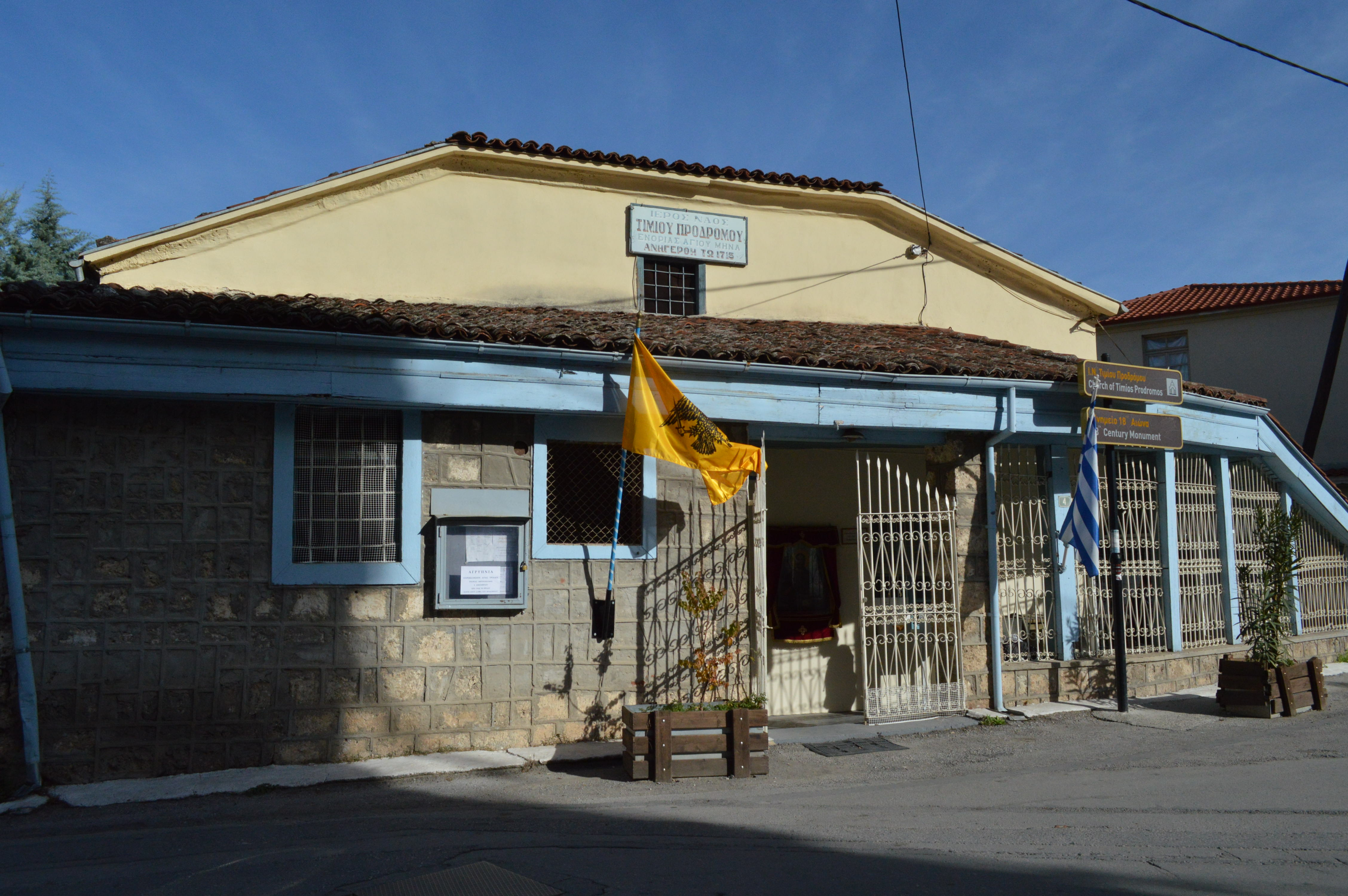 Εξωτερικό του Ναού